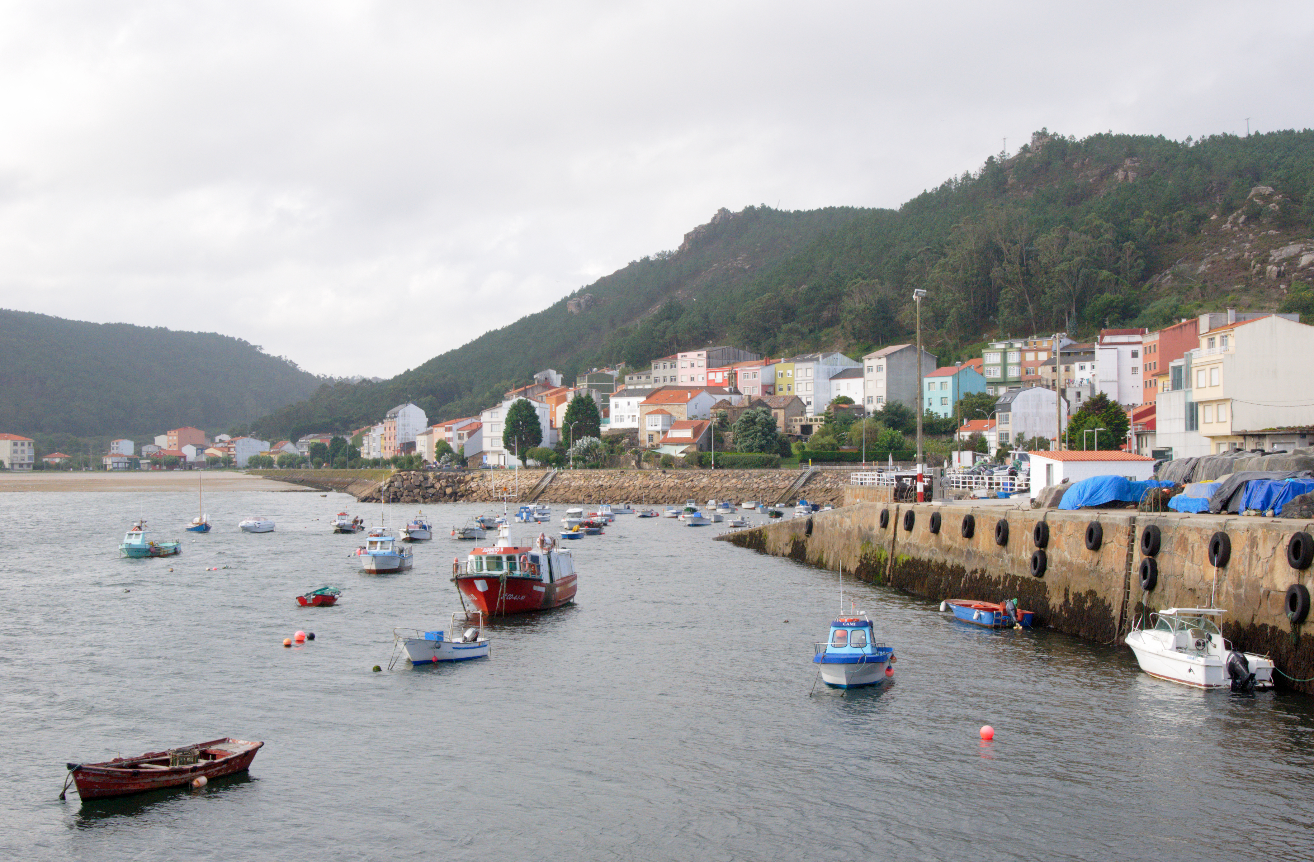 Camelle en Galicia